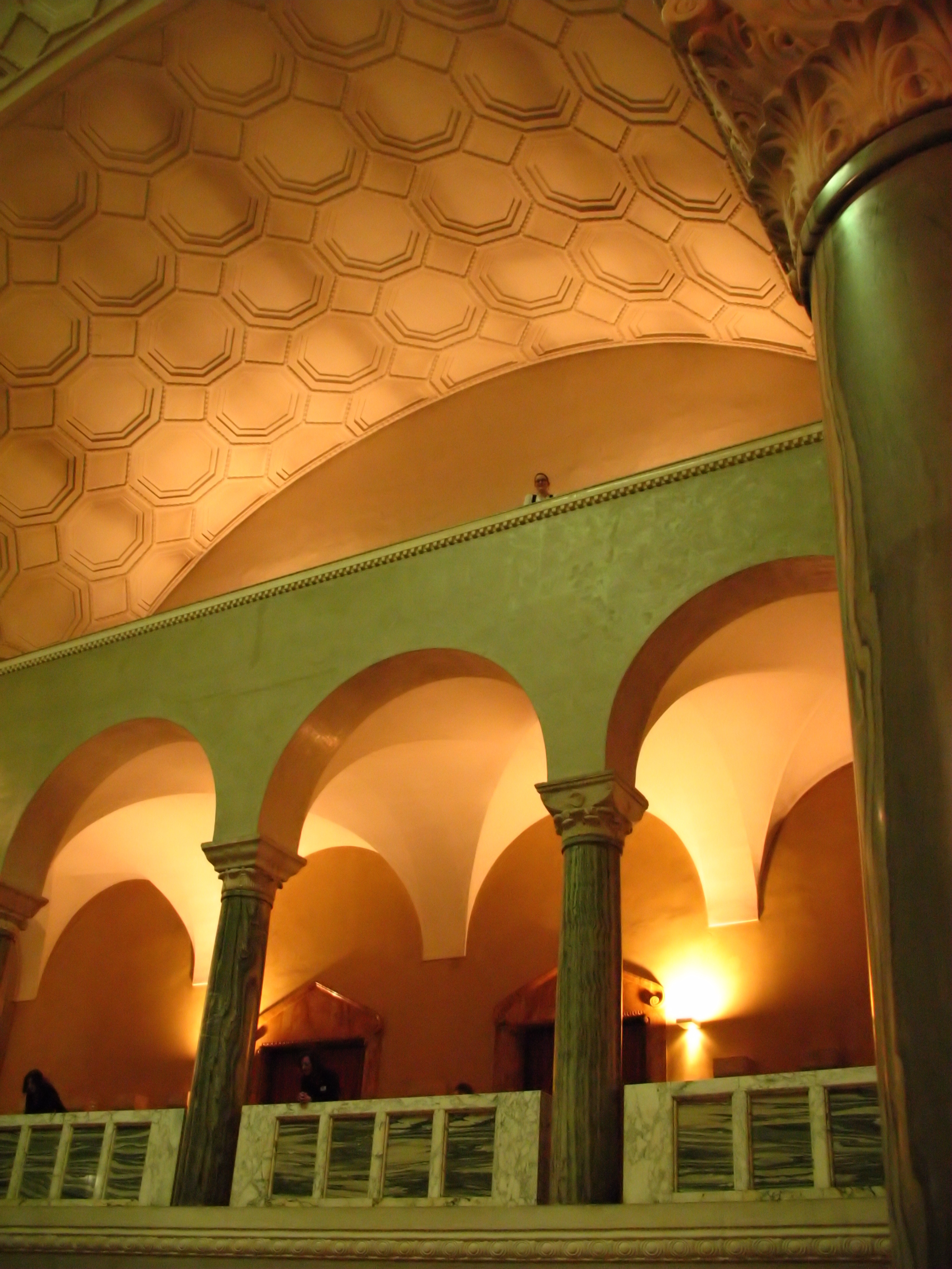 München, Ludwig-Maximilian Universität, Lichthof